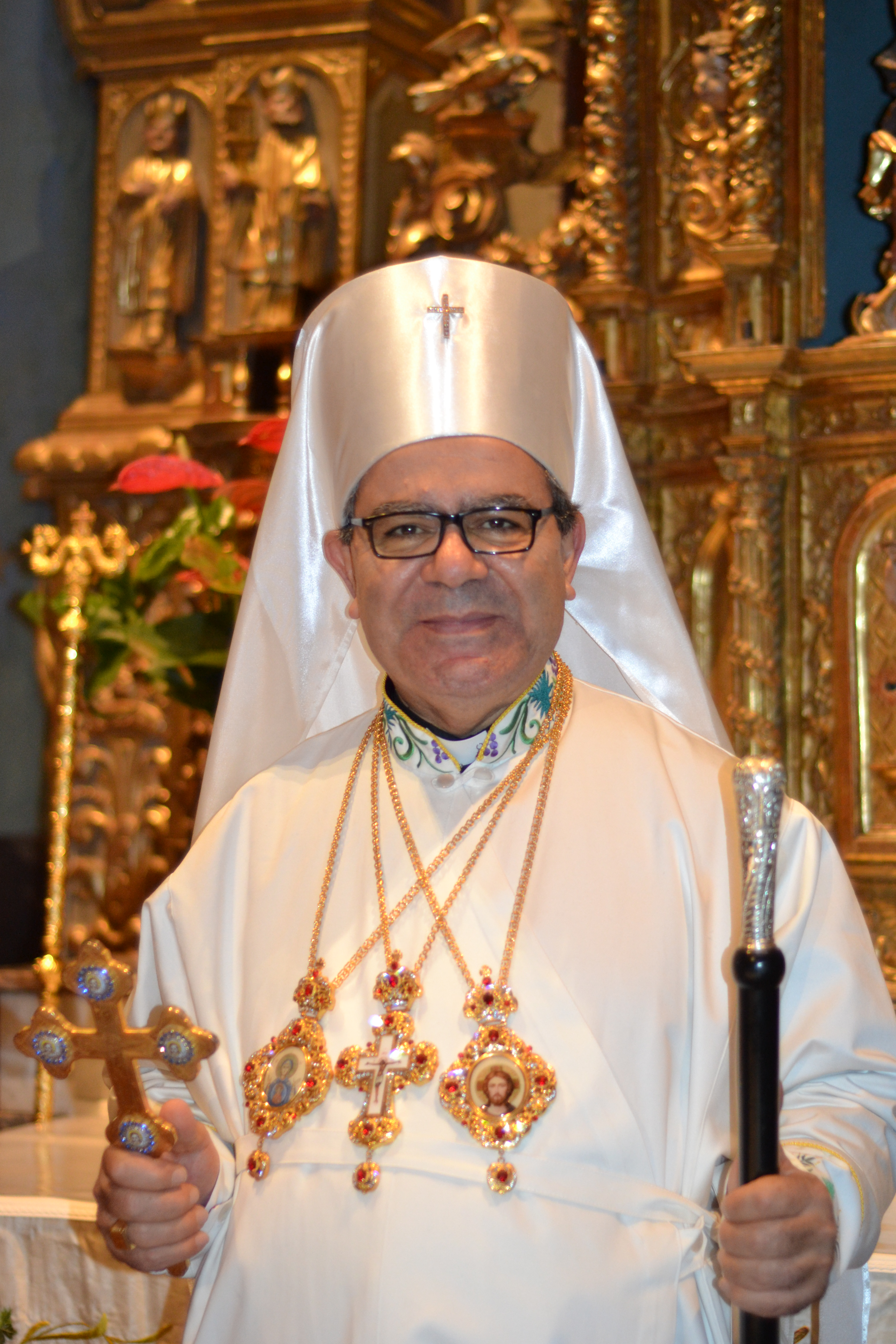 قداسة البطريرك بنيامين الأول عبود بطريرك كنيسة الوحدة في العالم